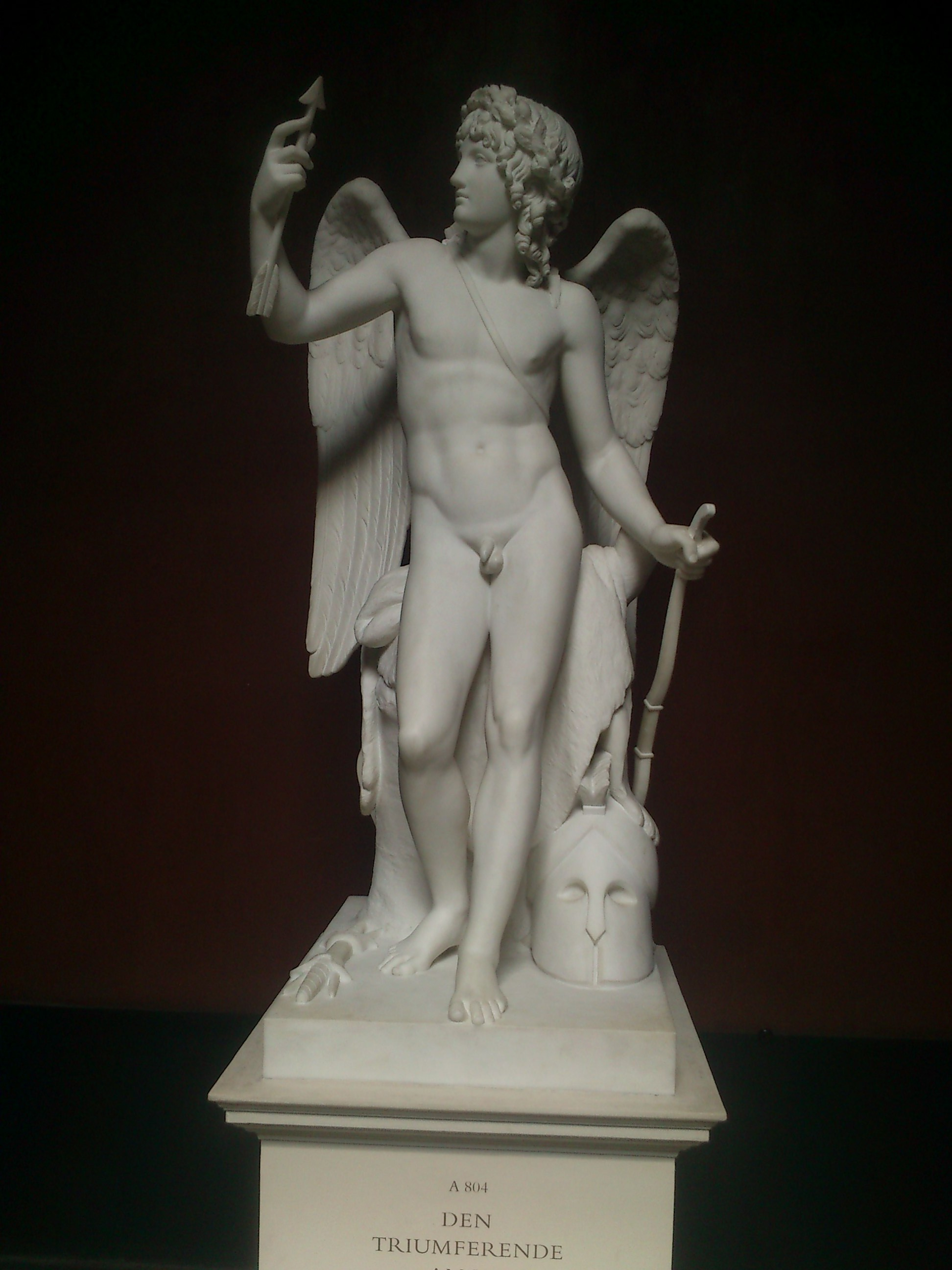 Statuen lavet af Bertel Thorvaldsen